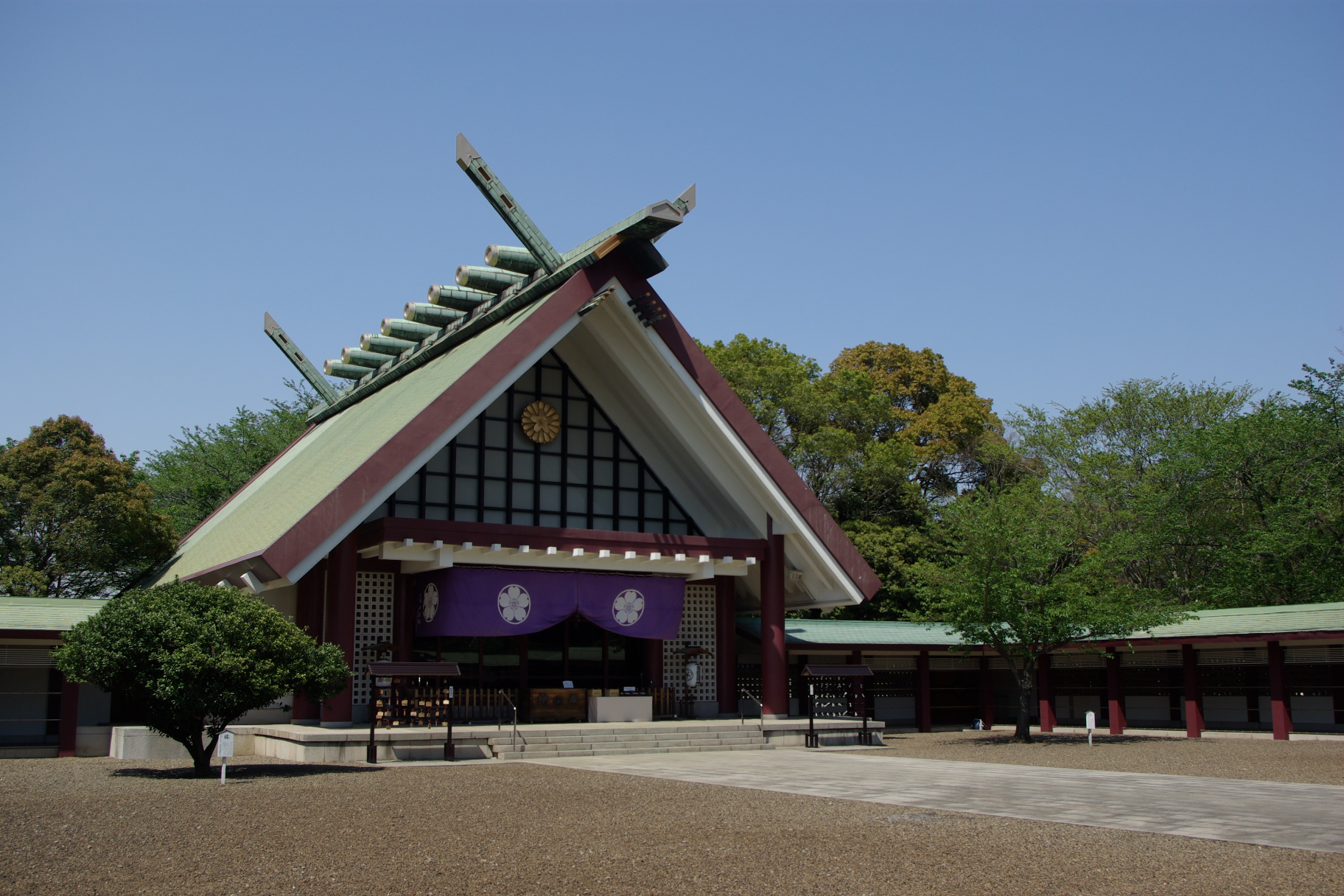 千葉縣護國神社